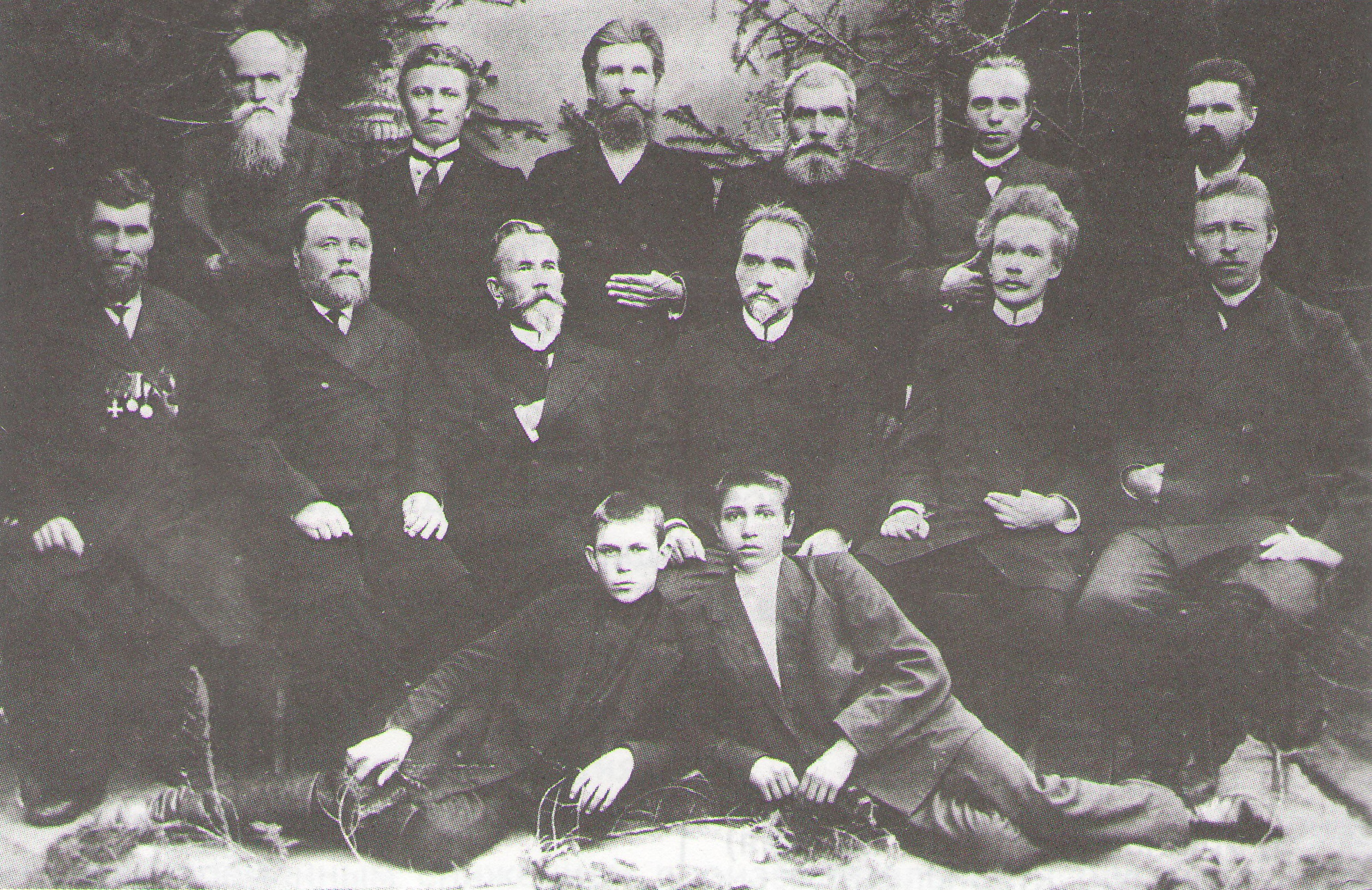 Н.А. Тунев и служащие Билимбаевского завода, 1890-е годы